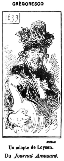 Caricatură apărută în jurnalul Journal Amusant după pictura Evreu cu gâscă.